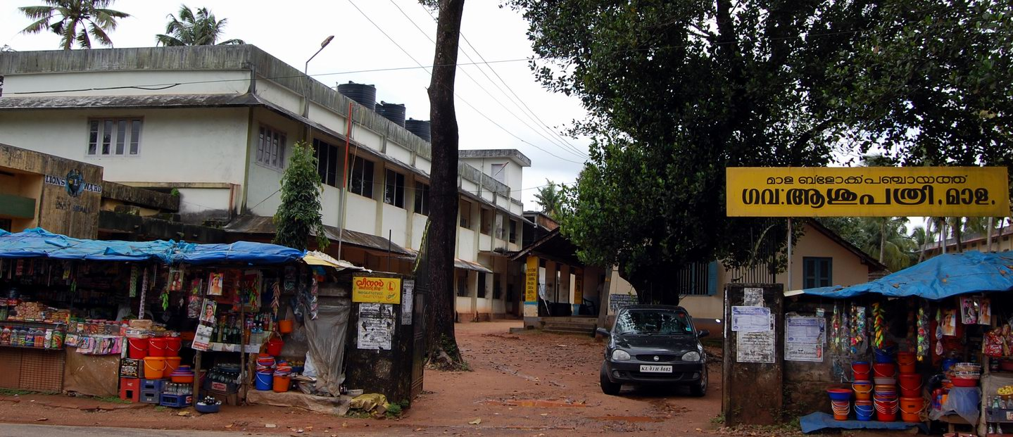 മാള-സർക്കാരാശുപത്രി